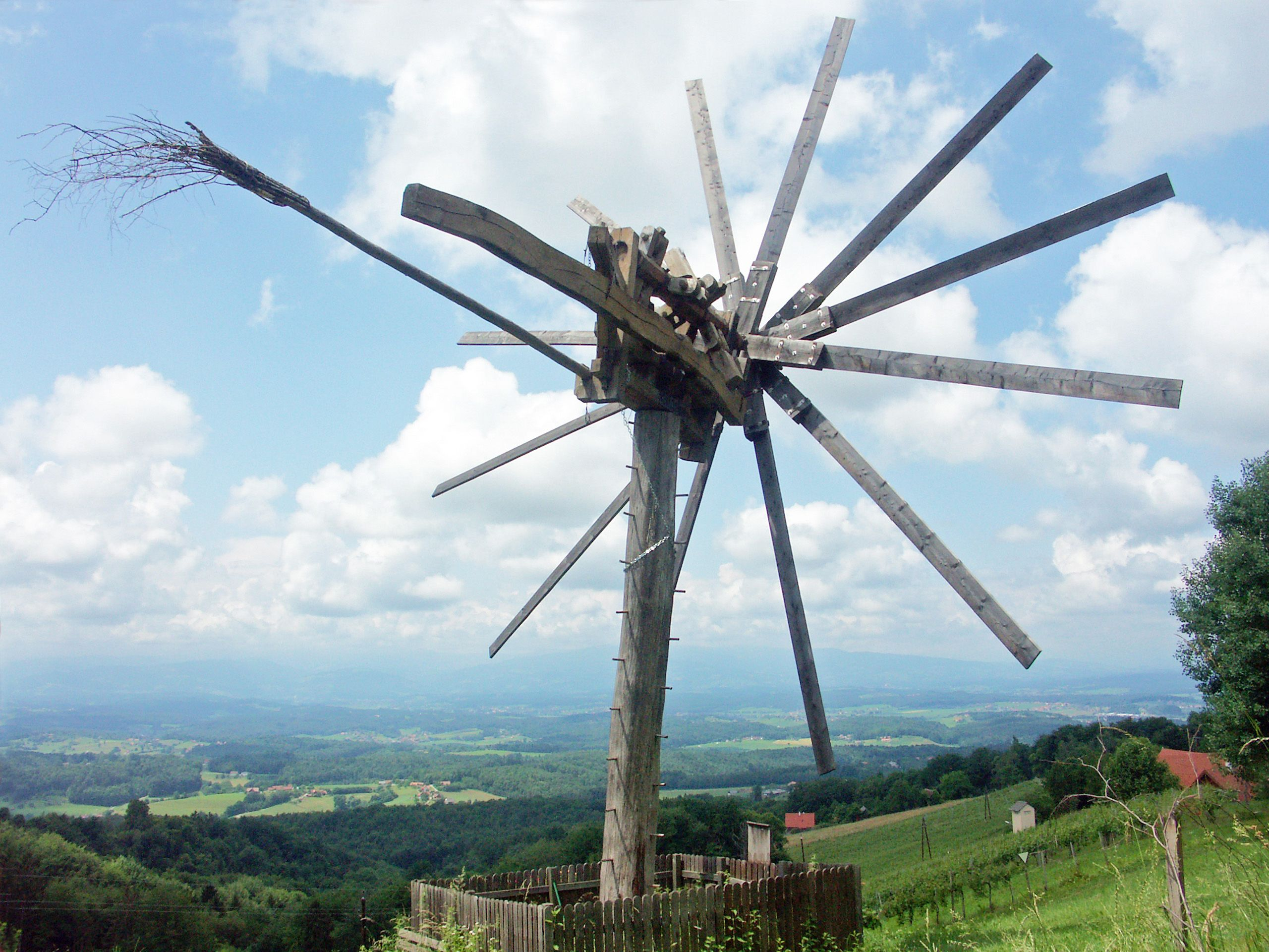 Der Riesenklapotetz am Dämmerkogel im Jahr 2008